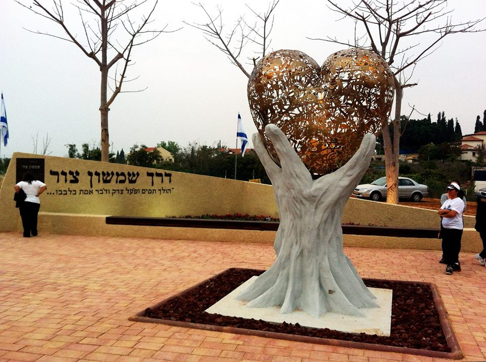 עבודת בטון וברזל בנפחים. פסל: ישראל פרימו 300 ס"מ